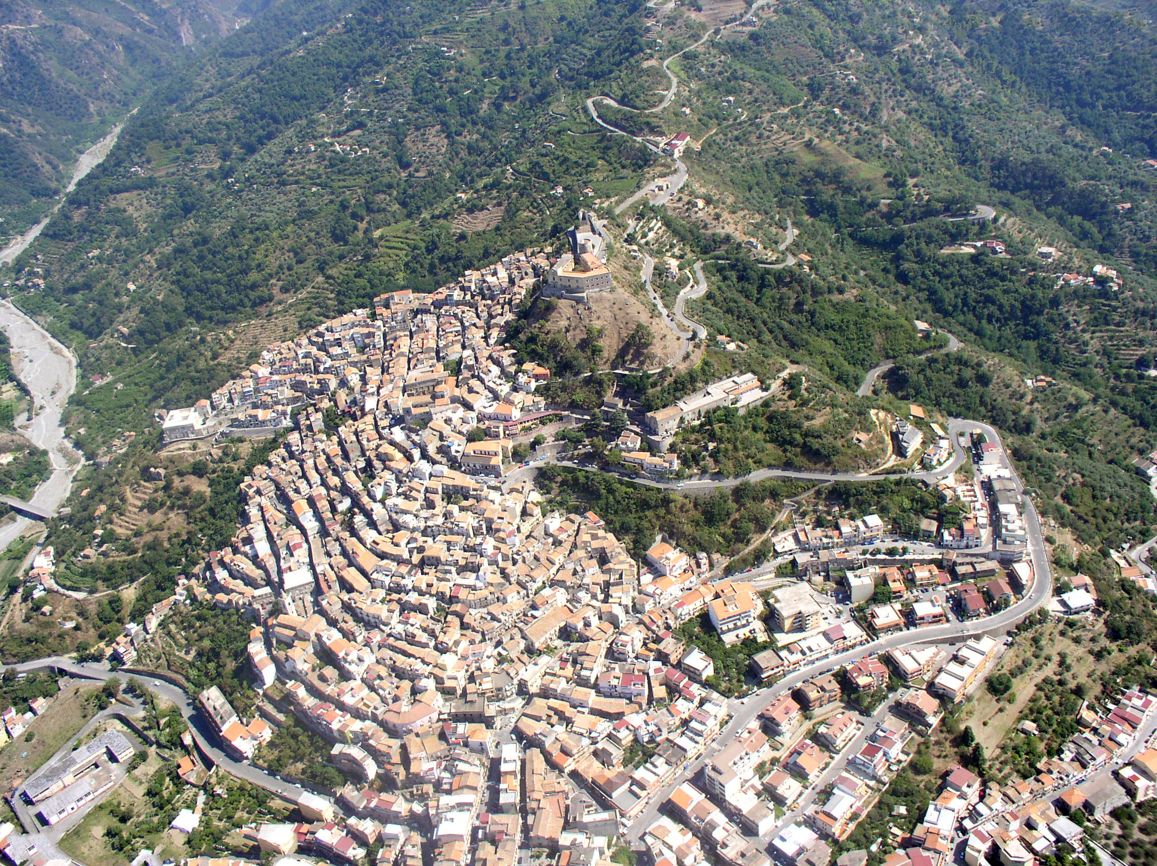 Foto Profilo Santa Lucia del Mela, Messina, Sicilia, Italia.